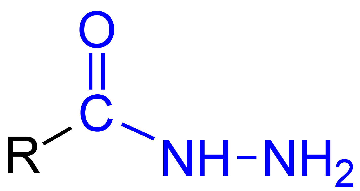 Acyl_Acide_(General_Structure)